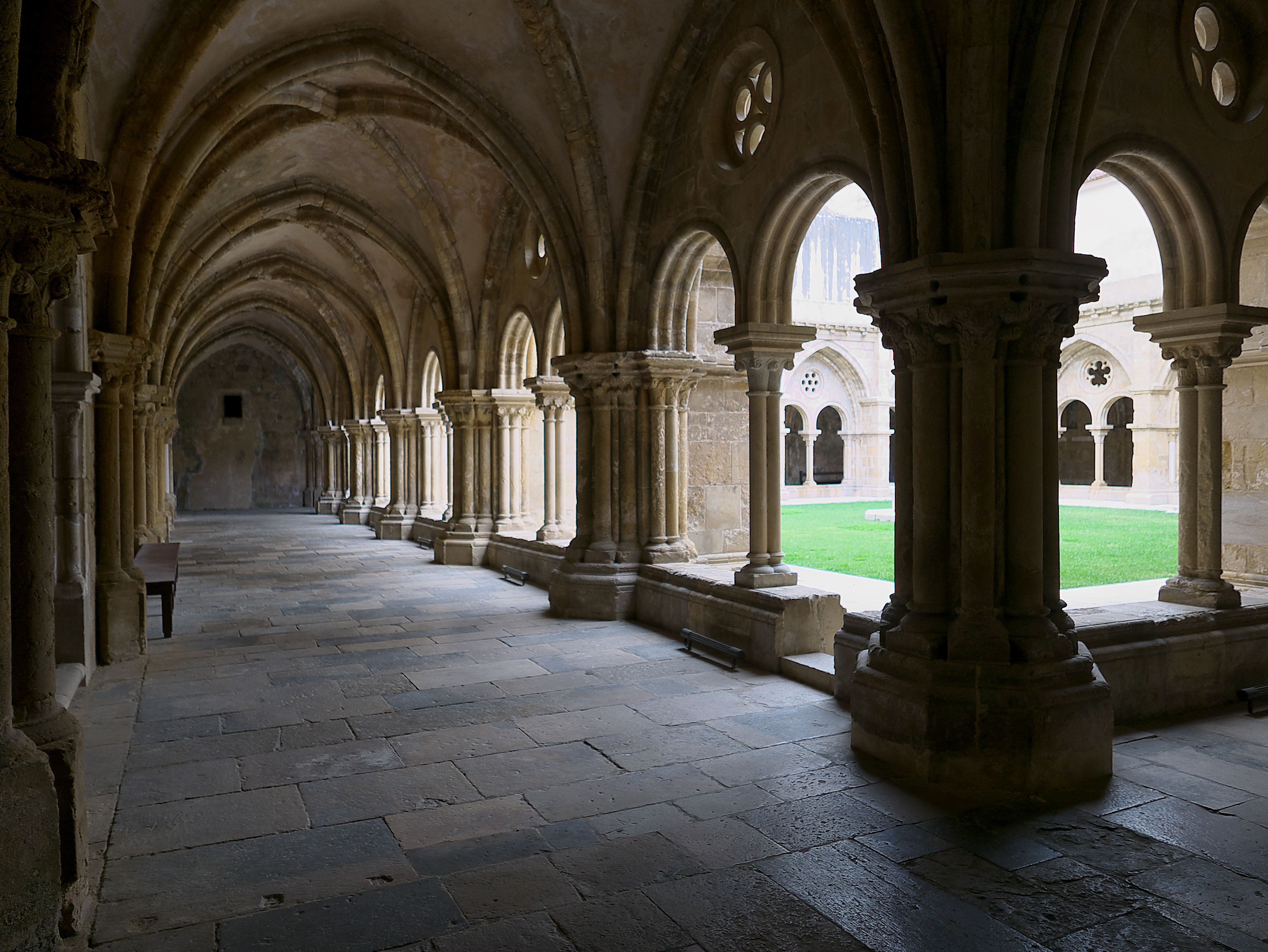 Galería del claustro (s. XIII)